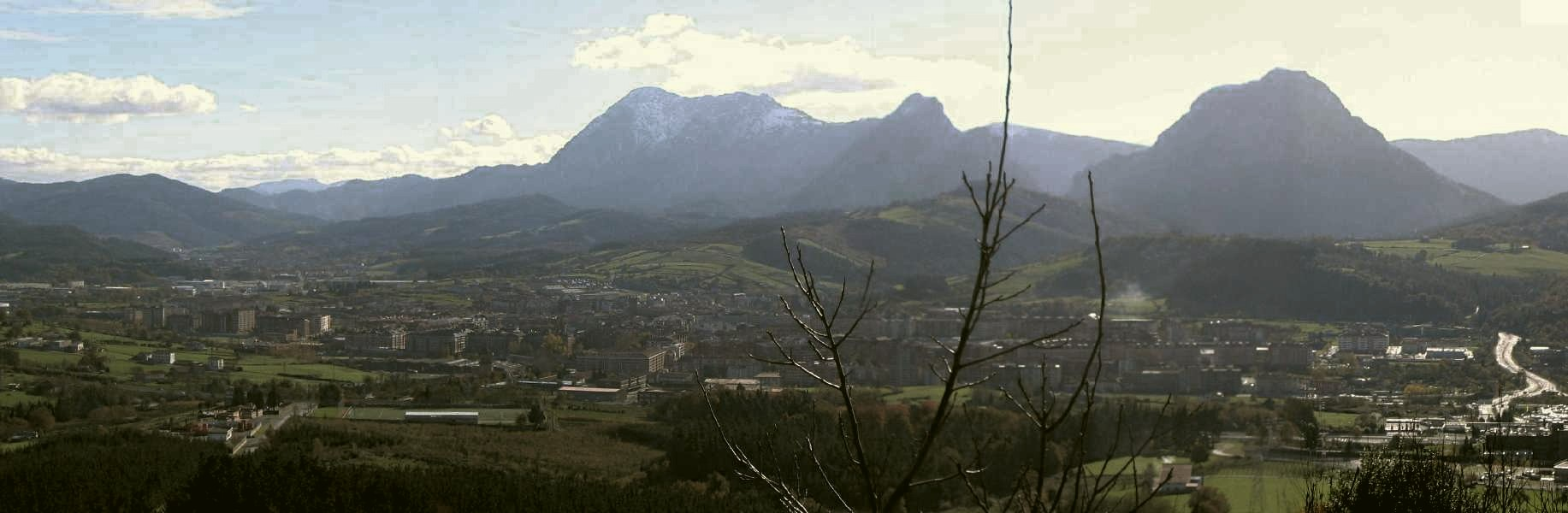 Vista general de Durango en Vizcaya, País Vaco, España.